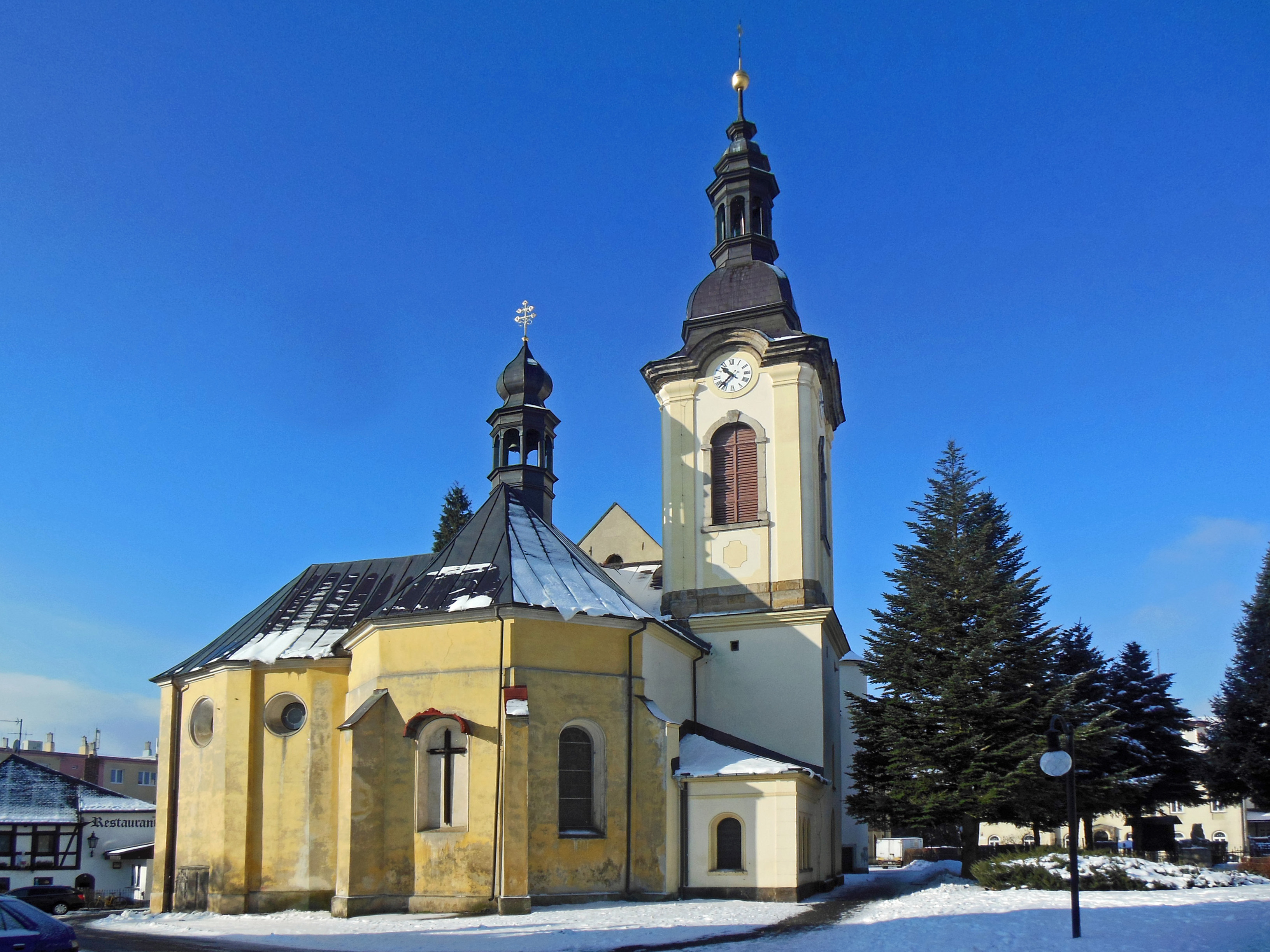 Rumburk (okres Děčín). Náměstí Dobrovského, kostel svatého Bartoloměje.